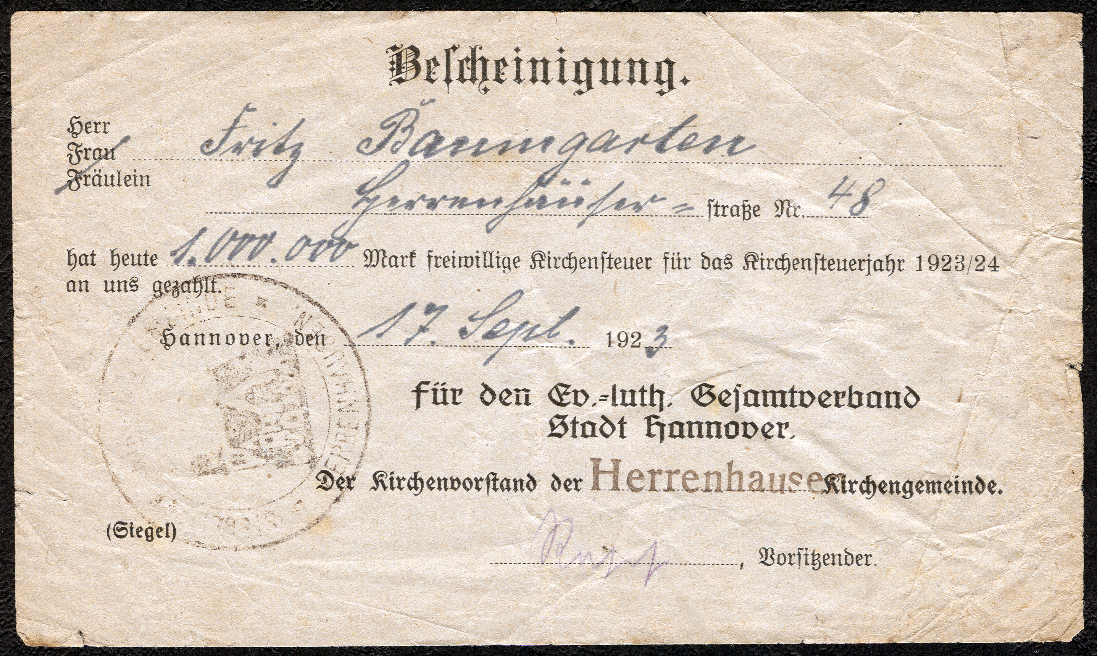 „Bescheinigung Herr Frau Fräulein Fritz Baumgarten, Herrenhäuser Straße Nr. 48 [heute: Stöckener Straße 21] hat heute 1.000.000 Mark freiwillige Kirchensteuer für das Kirchensteuerjahr 1923/24 an uns gezahlt. Hannover, den 17. Sept. 1923; für den Ev.-luth. Gesamtverband Stadt Hannover, Der Kirchenvorstand, Rasch, Vorsitzender“ (Stempel-Abdruck mit dem Siegel der Herrenhäuser Kirche). Maße des Papieres aus der Zeit der deutschen Hyperinflation: ca. 15,5 cm x 9 cm, Rückseite blanco ...